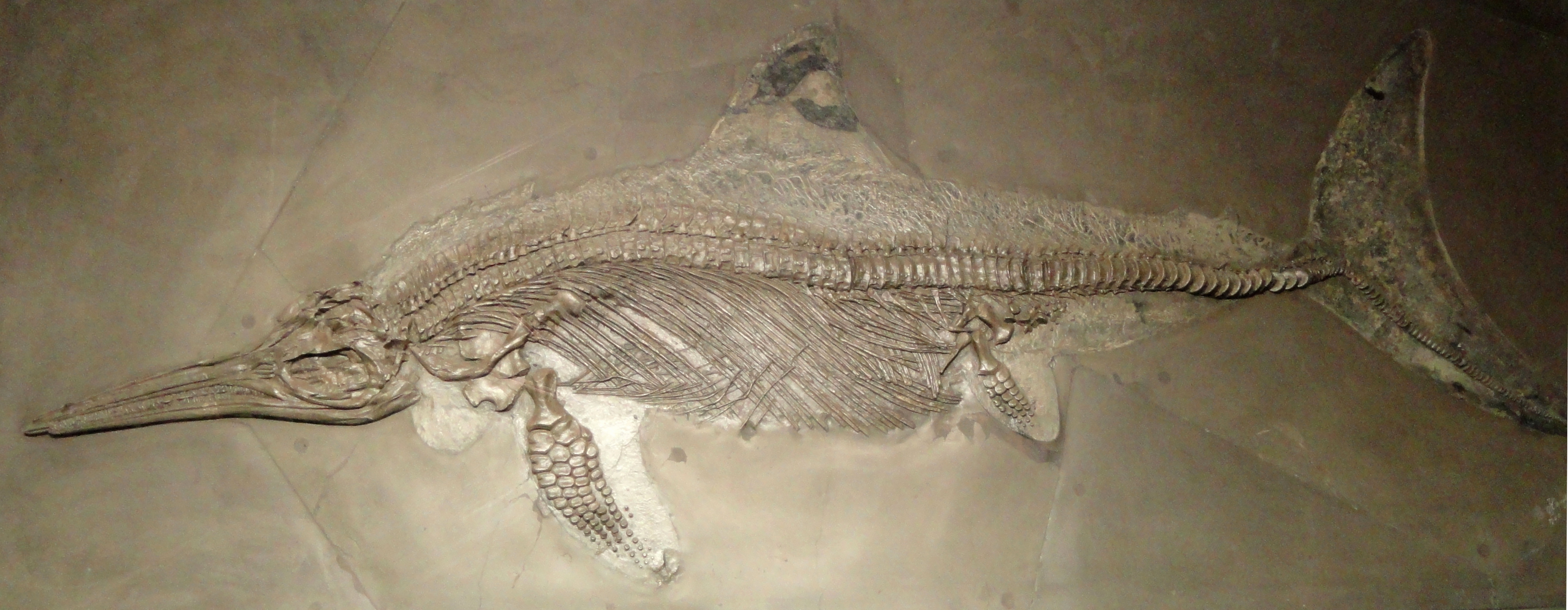 Exhibit in Naturmuseum Senckenberg, Frankfurt am Main, Germany.